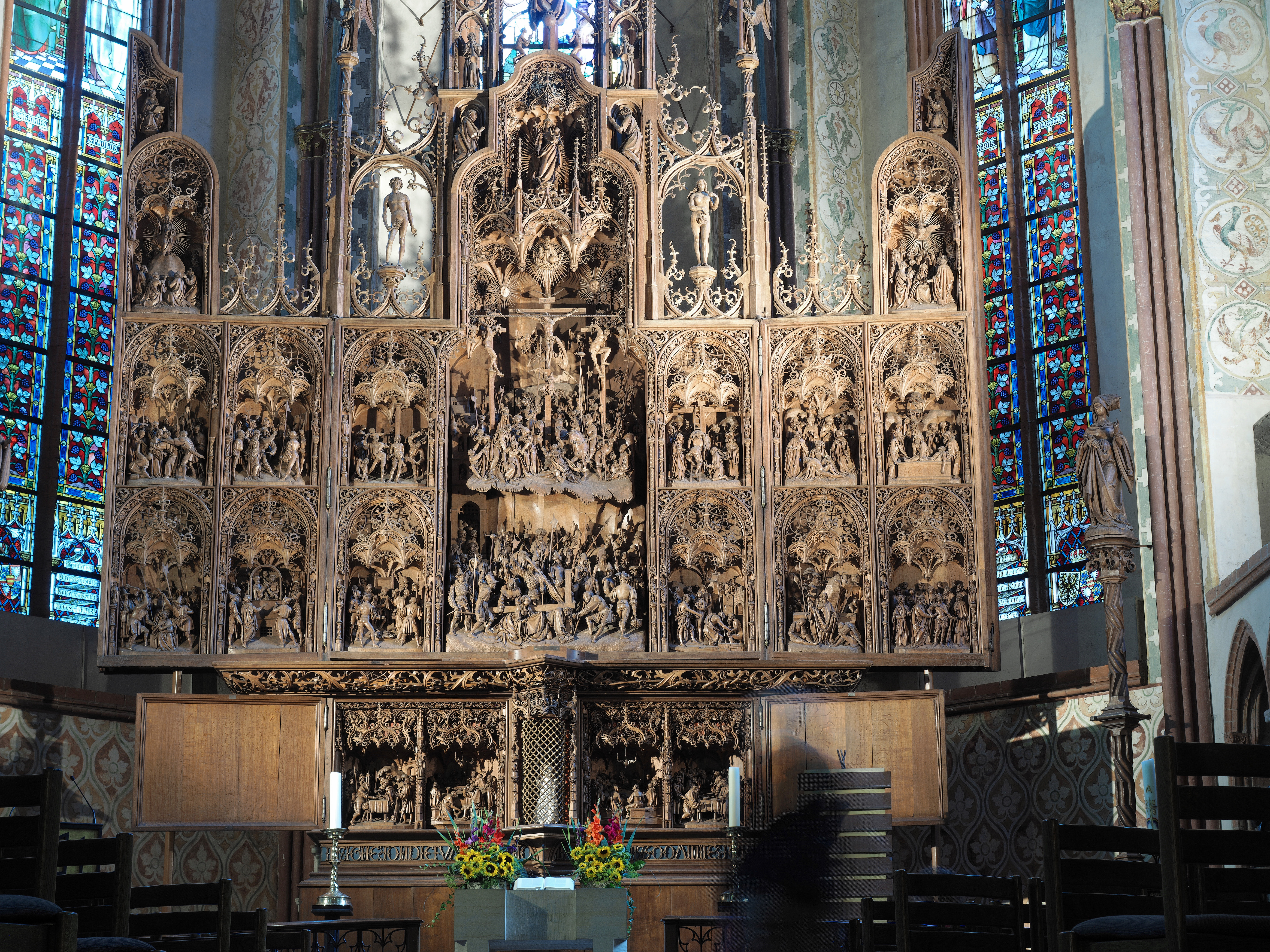 Bordesholmer Altar von Hans Brüggemann von 1521 im St. Petri Dom zu Schleswig, Ansicht von Westen.